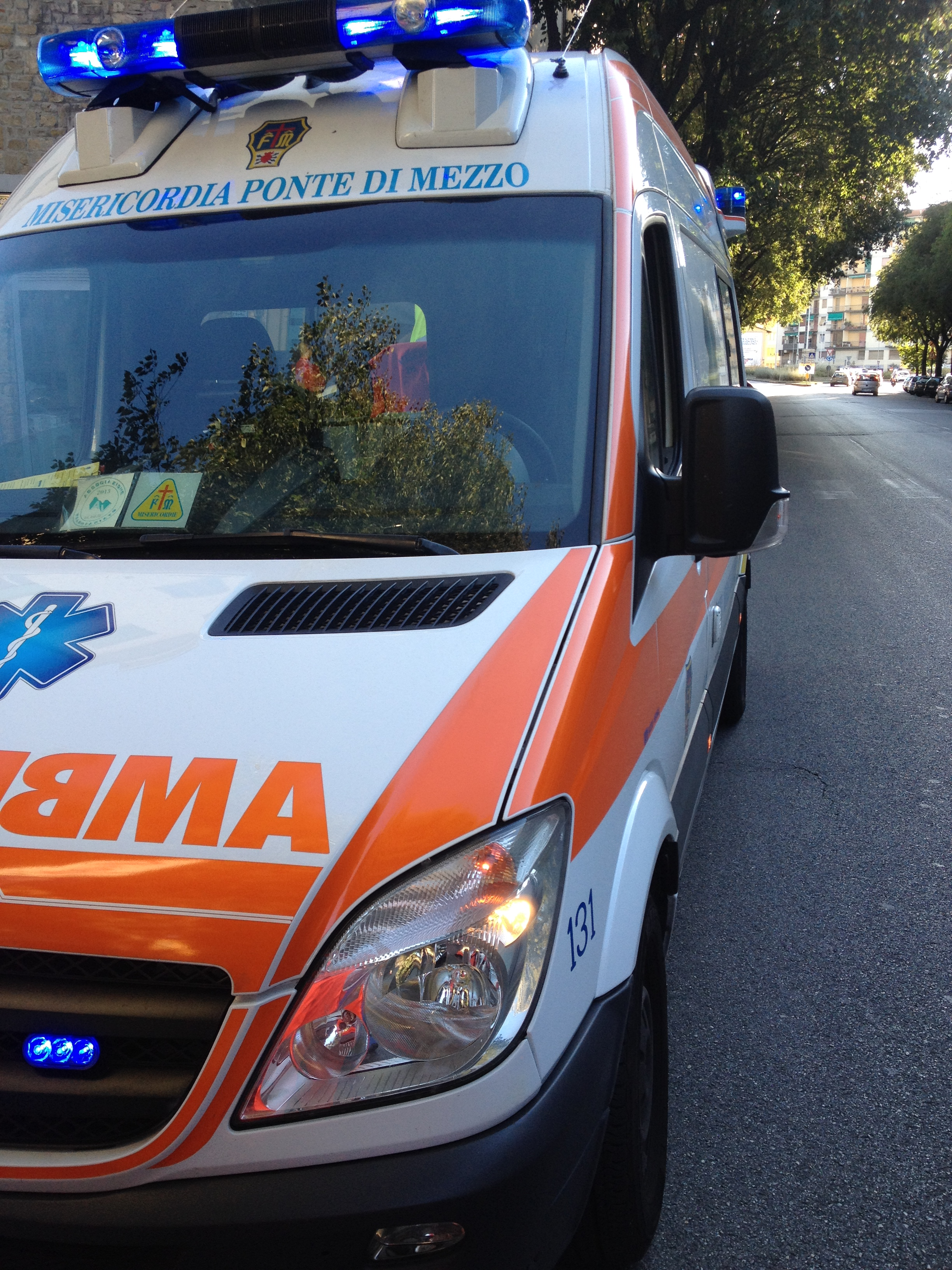 AMBULANZA DISLOCATA IN SEZIONE PONTE DI MEZZO